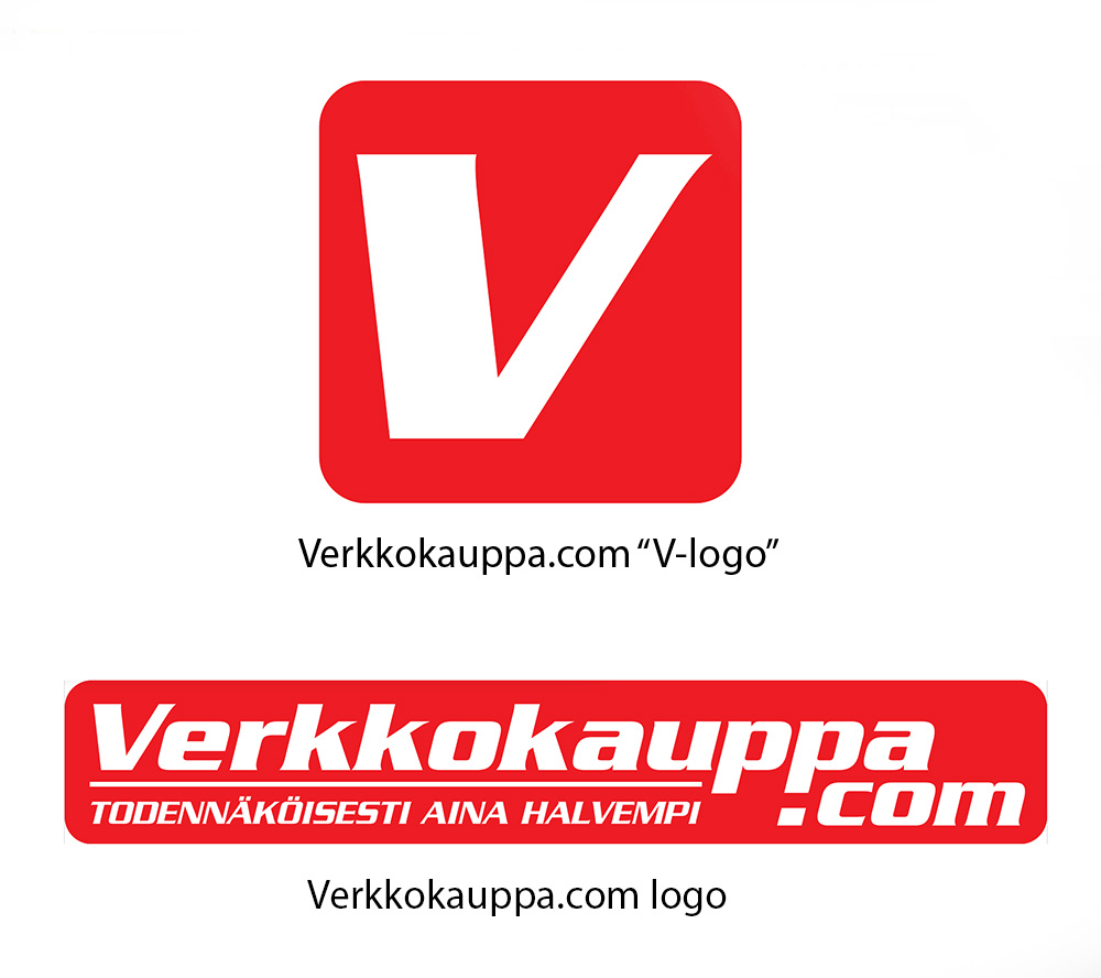 Verkkokauppa.comin logot